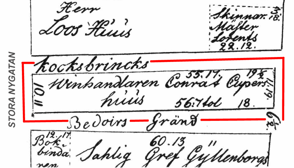 Del av tomtkarta nordvästra Gamla stan 1693 med kvarteret Parcas